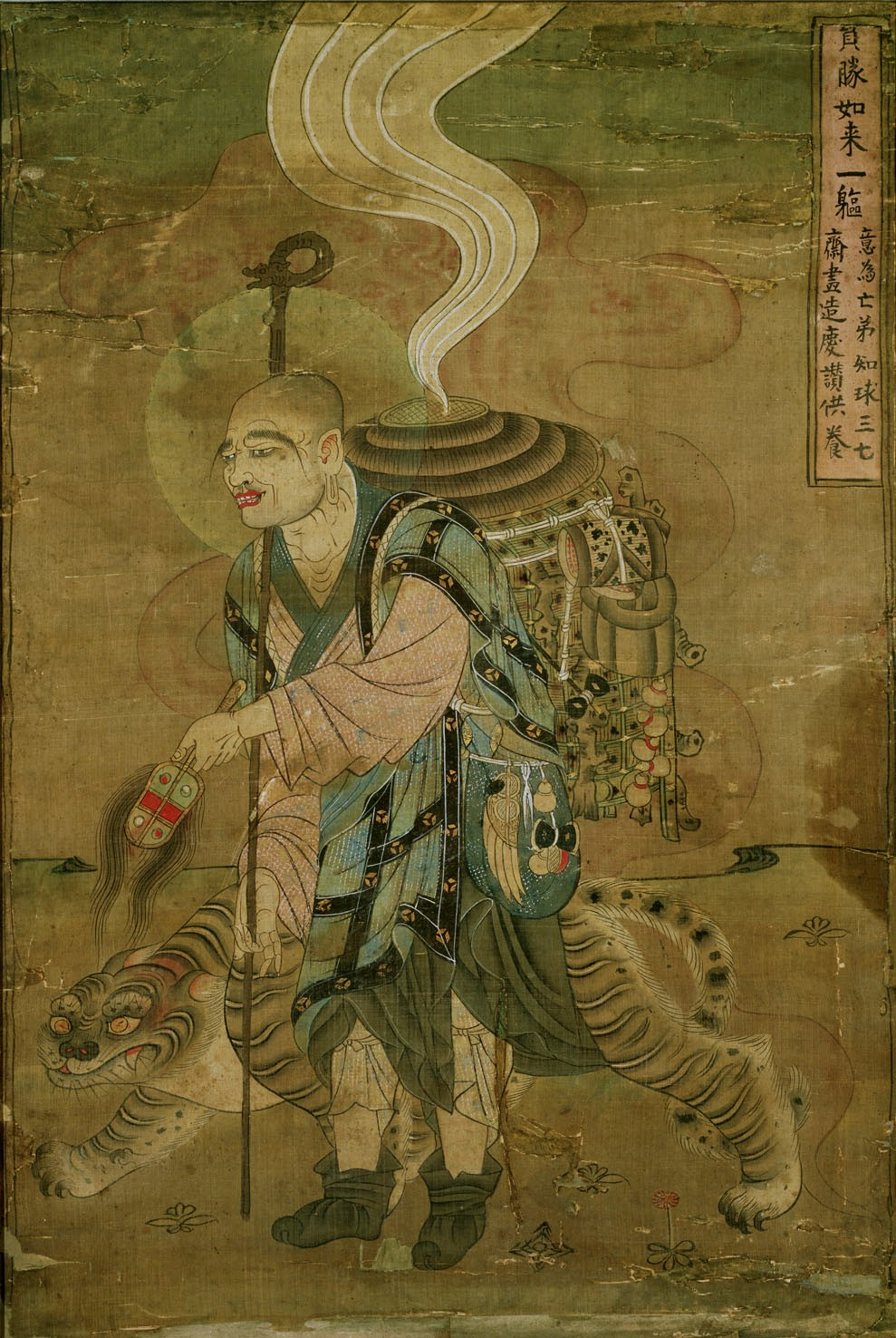 Странствующий_монах.(Сюаньцзан) Танка из пещ.17, Дуньхуан